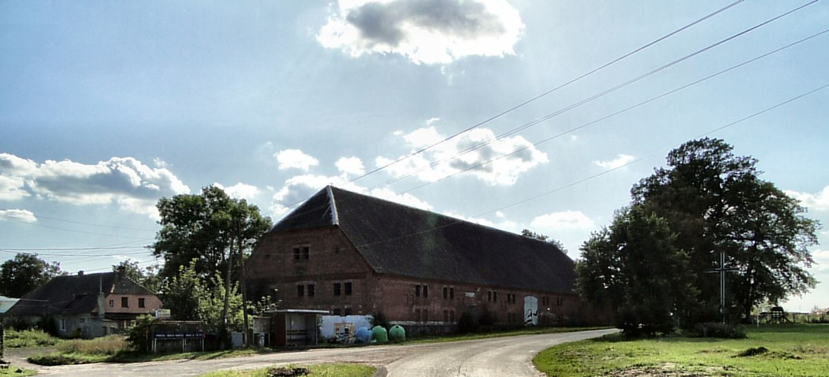 Magazyn z 1865 r. w Kurowie